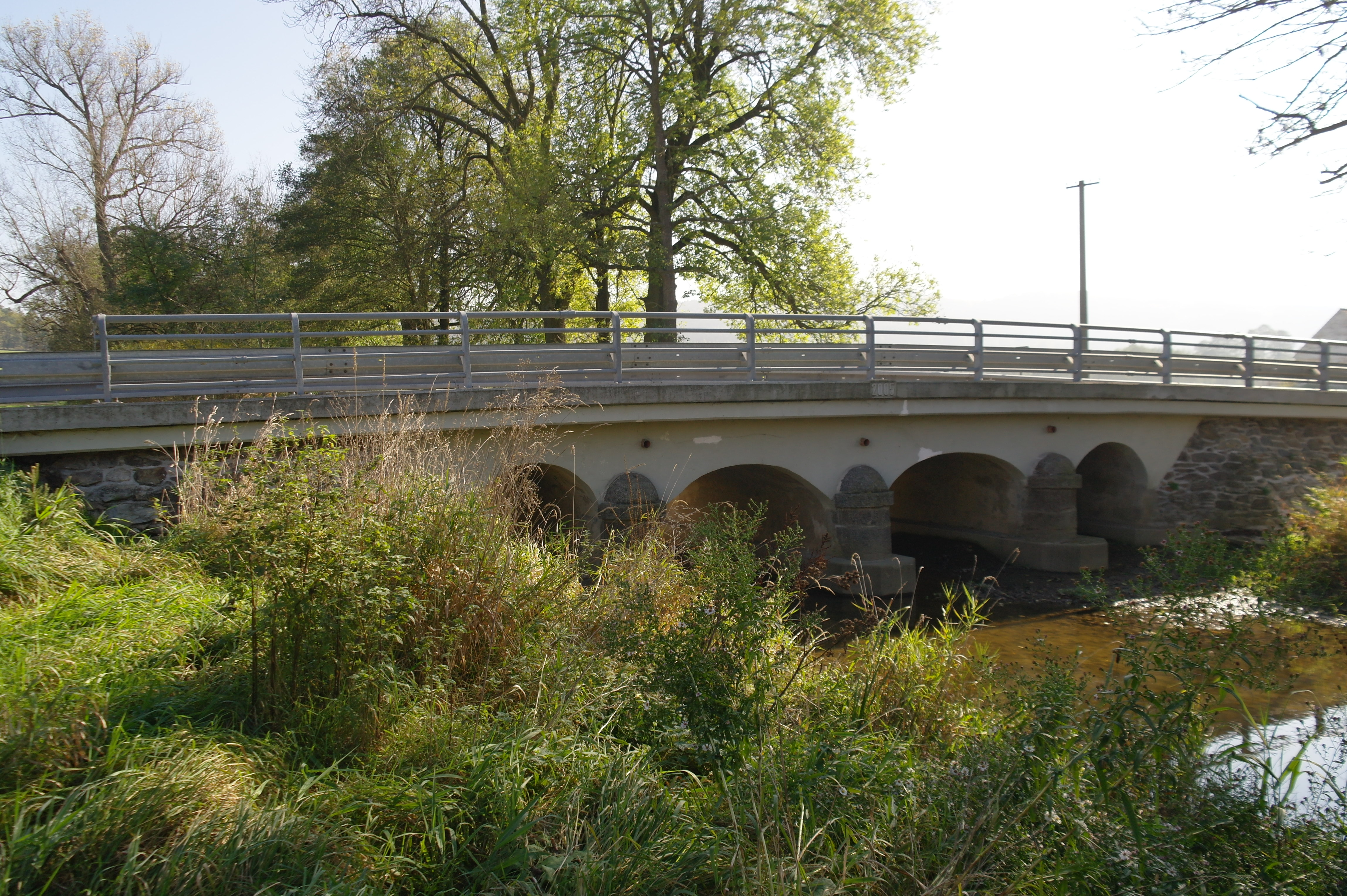 Silniční most přes Bílský potok ve Sviněticích